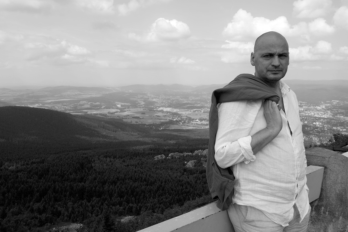 Jiří Jiroutek´s portrait